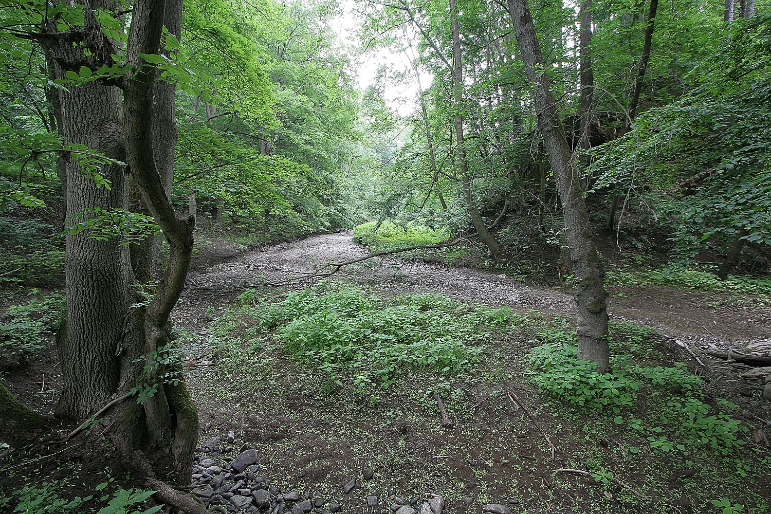 Propadání u Nové Rasovny u Holštejna